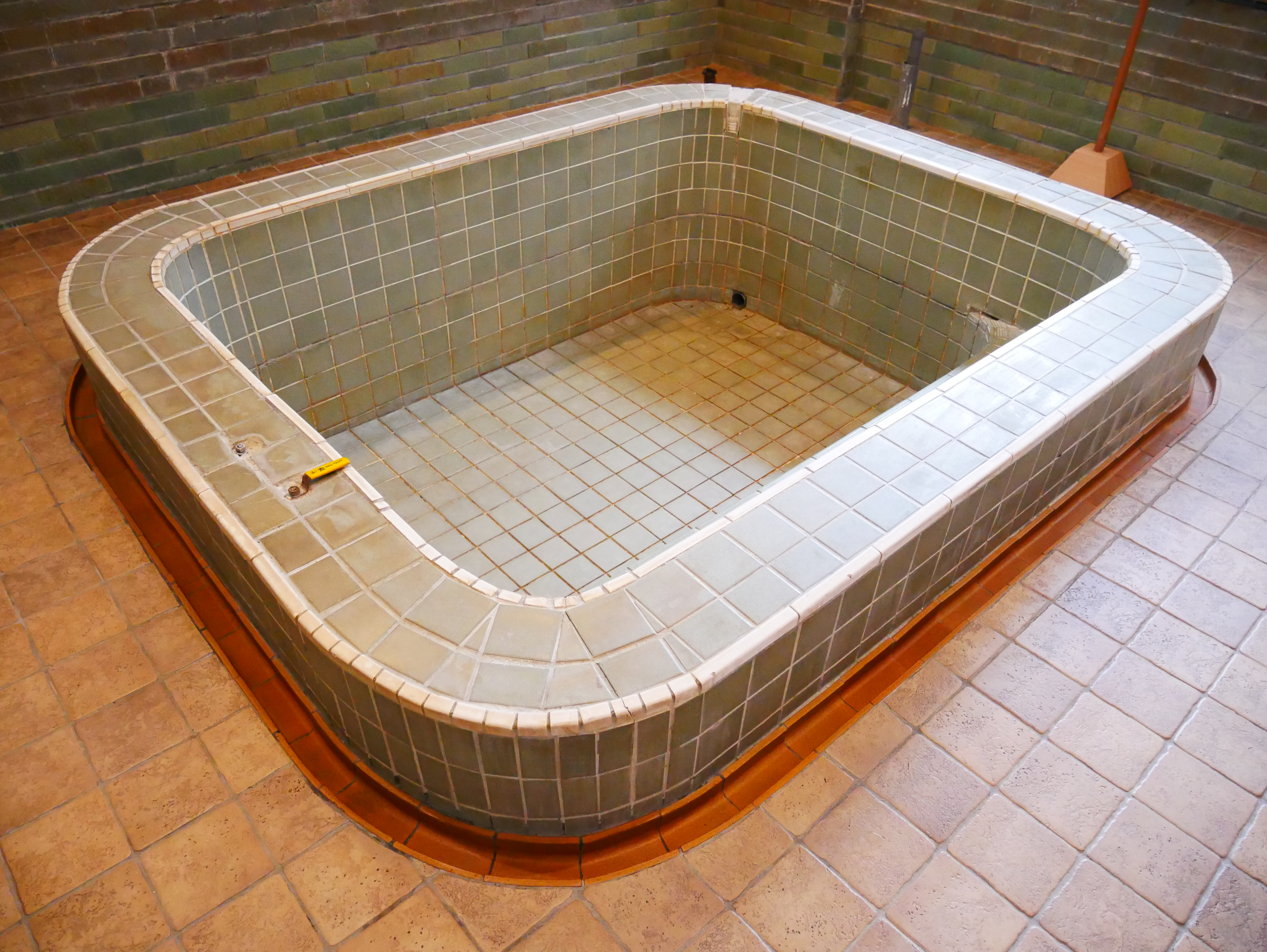 佳山旅館風呂，臺北市北投區新北投次分區林泉里